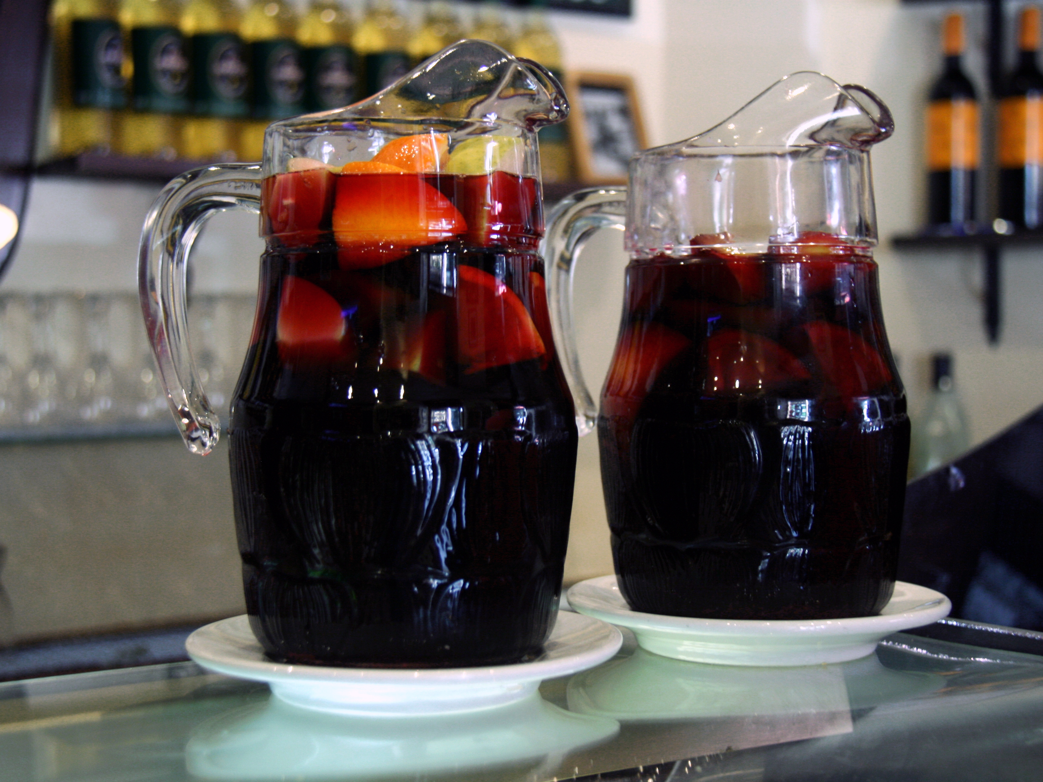 Sangría preparada para servir